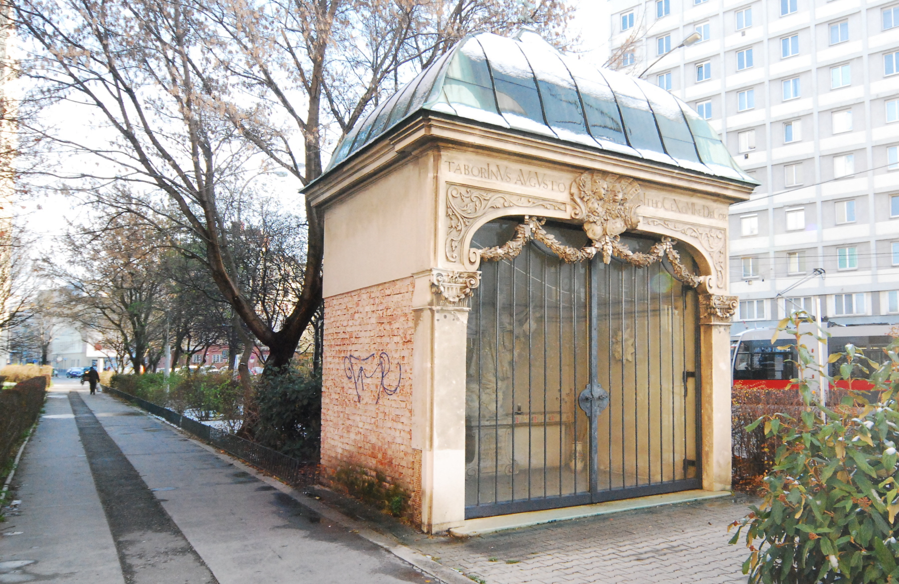 Johannes-Nepomuk-Kapelle (ehemalige Linienkapelle) Am Tabor, in der Leopoldstadt unmittelbar an der Grenze zur Brigittenau